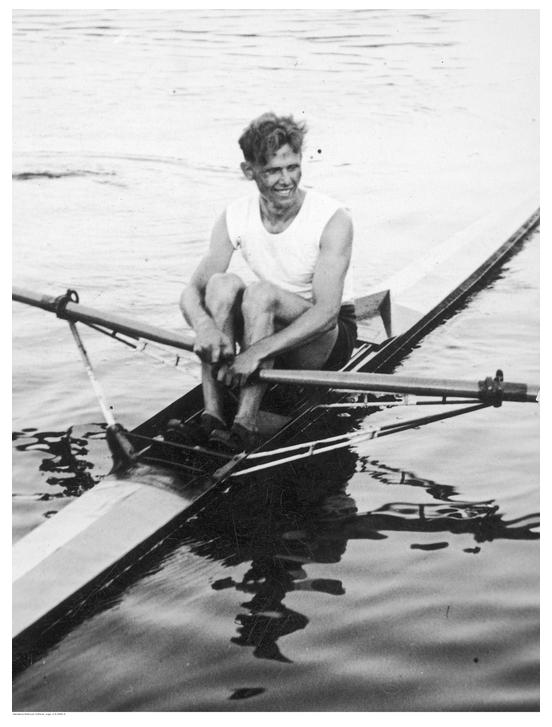 Jerzy Kepel (AZS Wilino) na jedynce podczas regat w Grudziądzu 1935